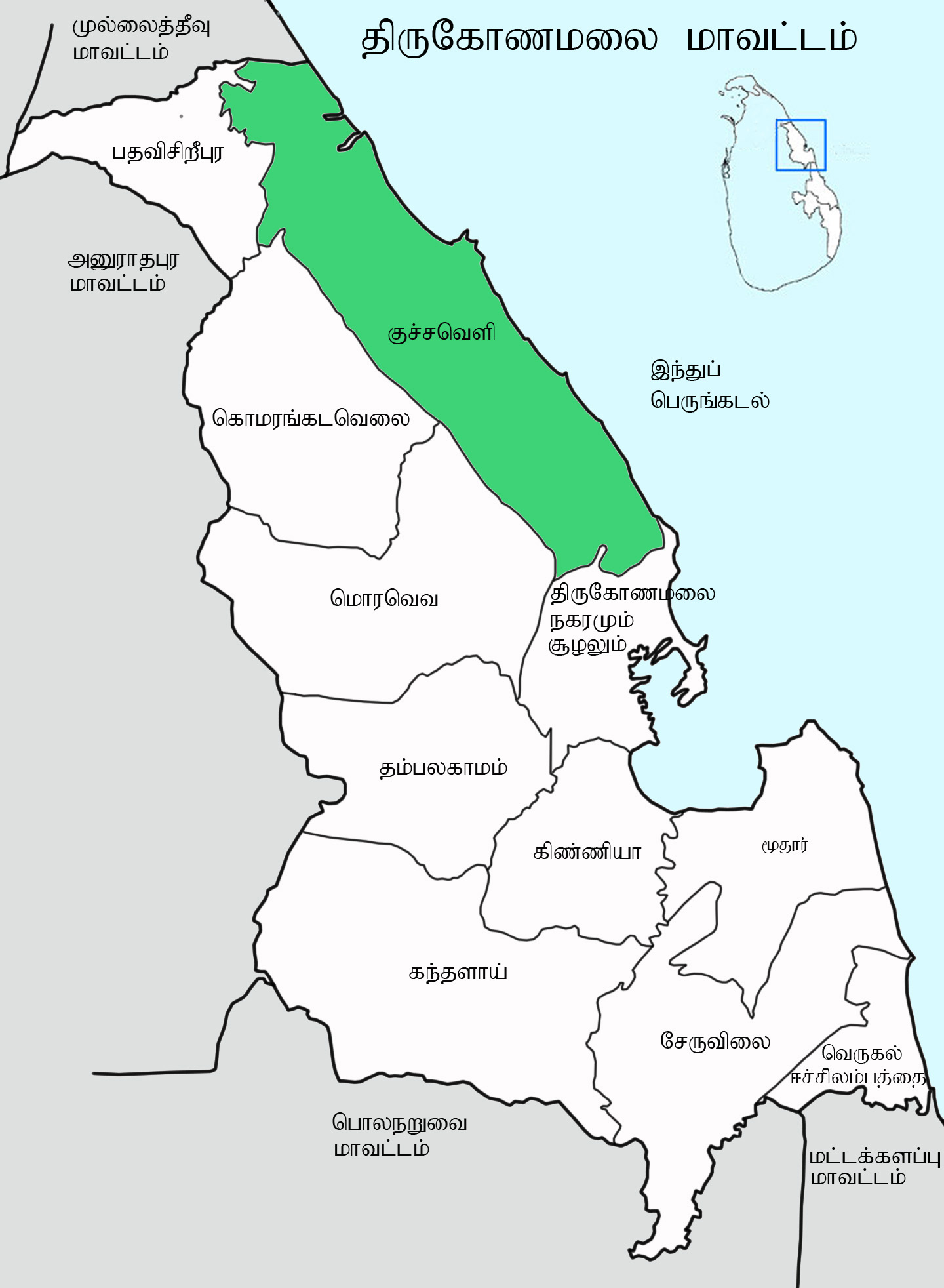 Map of Trincomalee District with Kuchchaveli DS division marked. Other information No